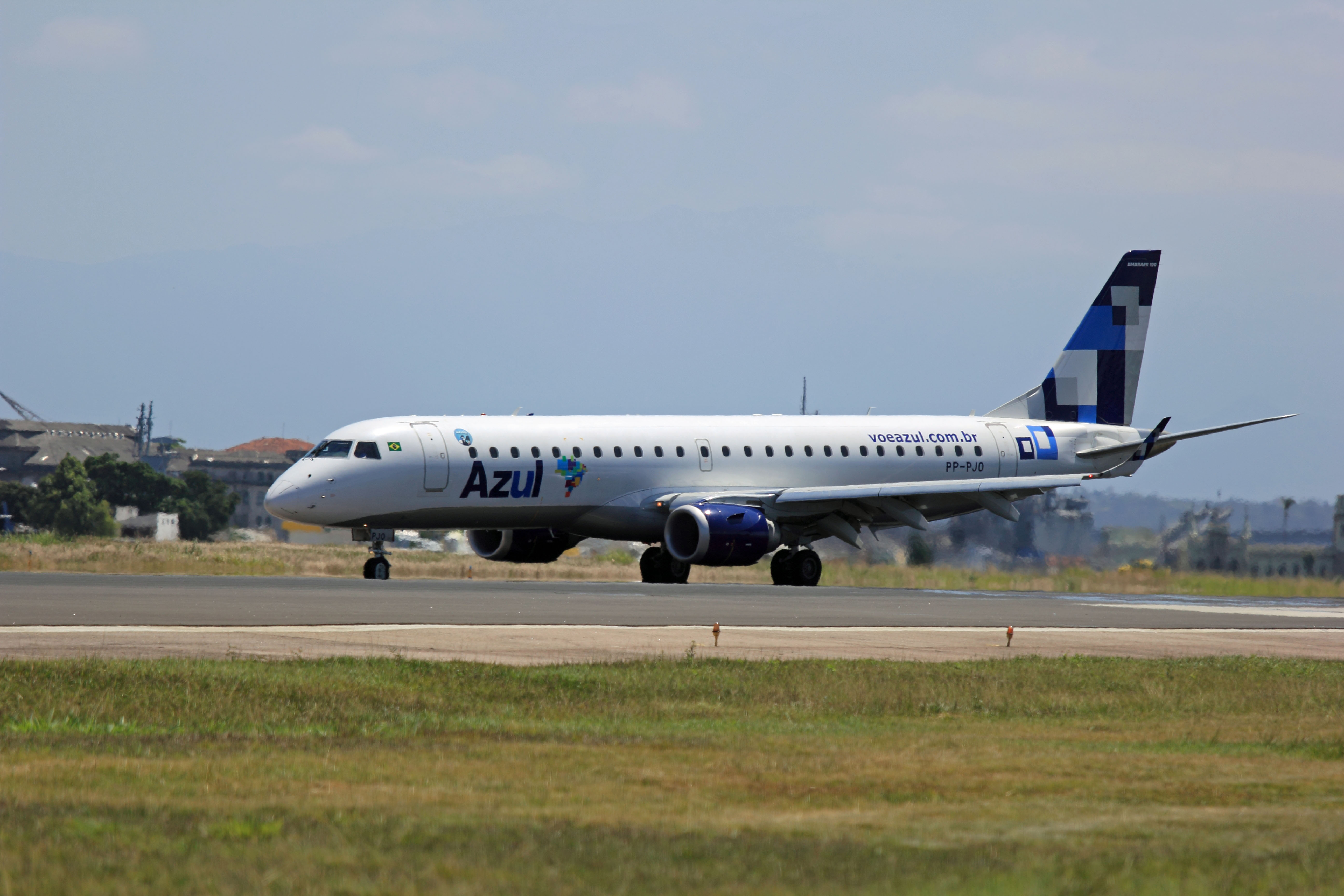 Azul - Linhas Aereas Brasileiras - Embraer ERJ-190-100LR 190LR - PP-PJO